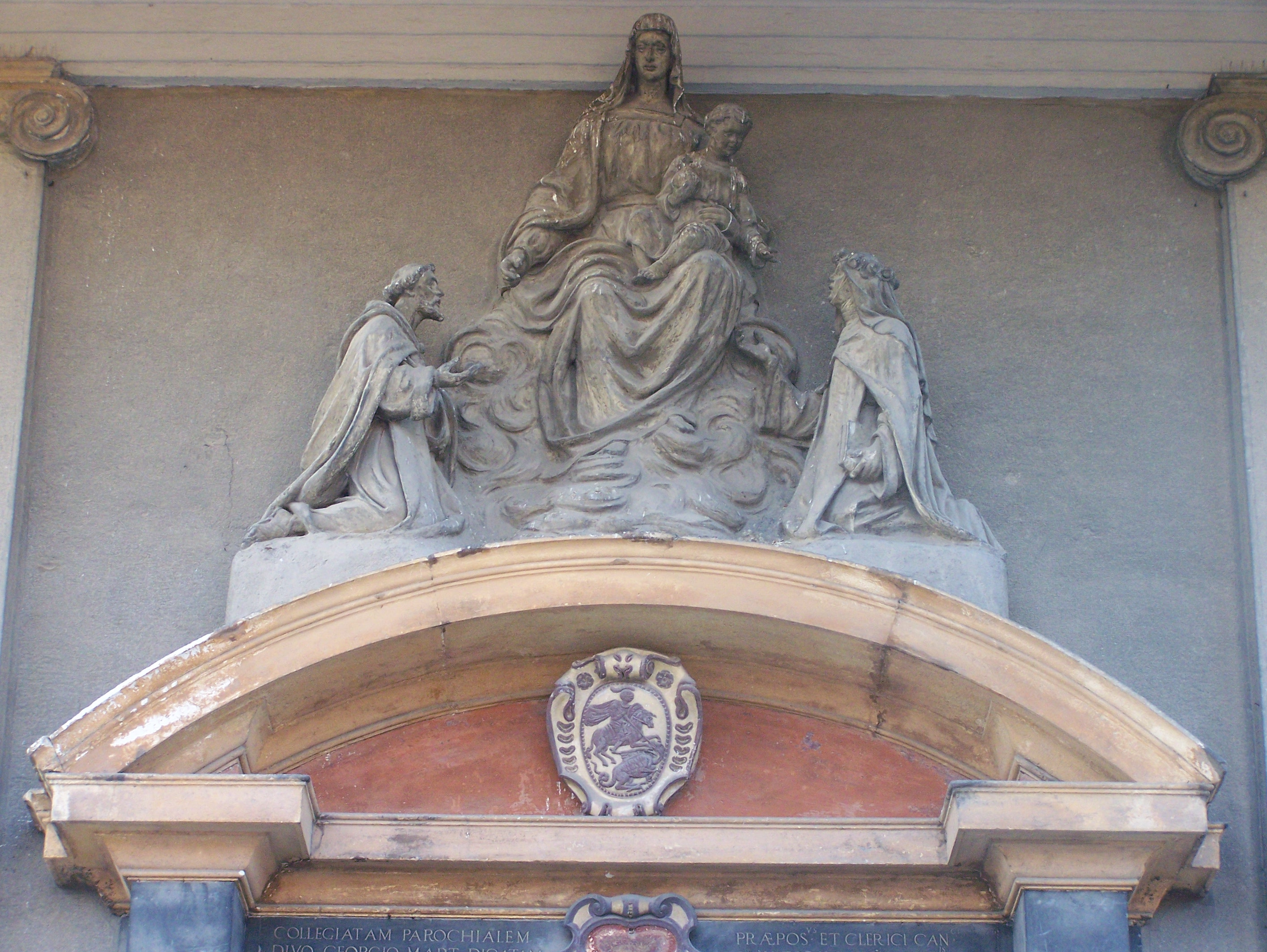 Il frontone del portale della chiesa parrocchiale di San Giorgio a Bernate Ticino (MI) - Italy